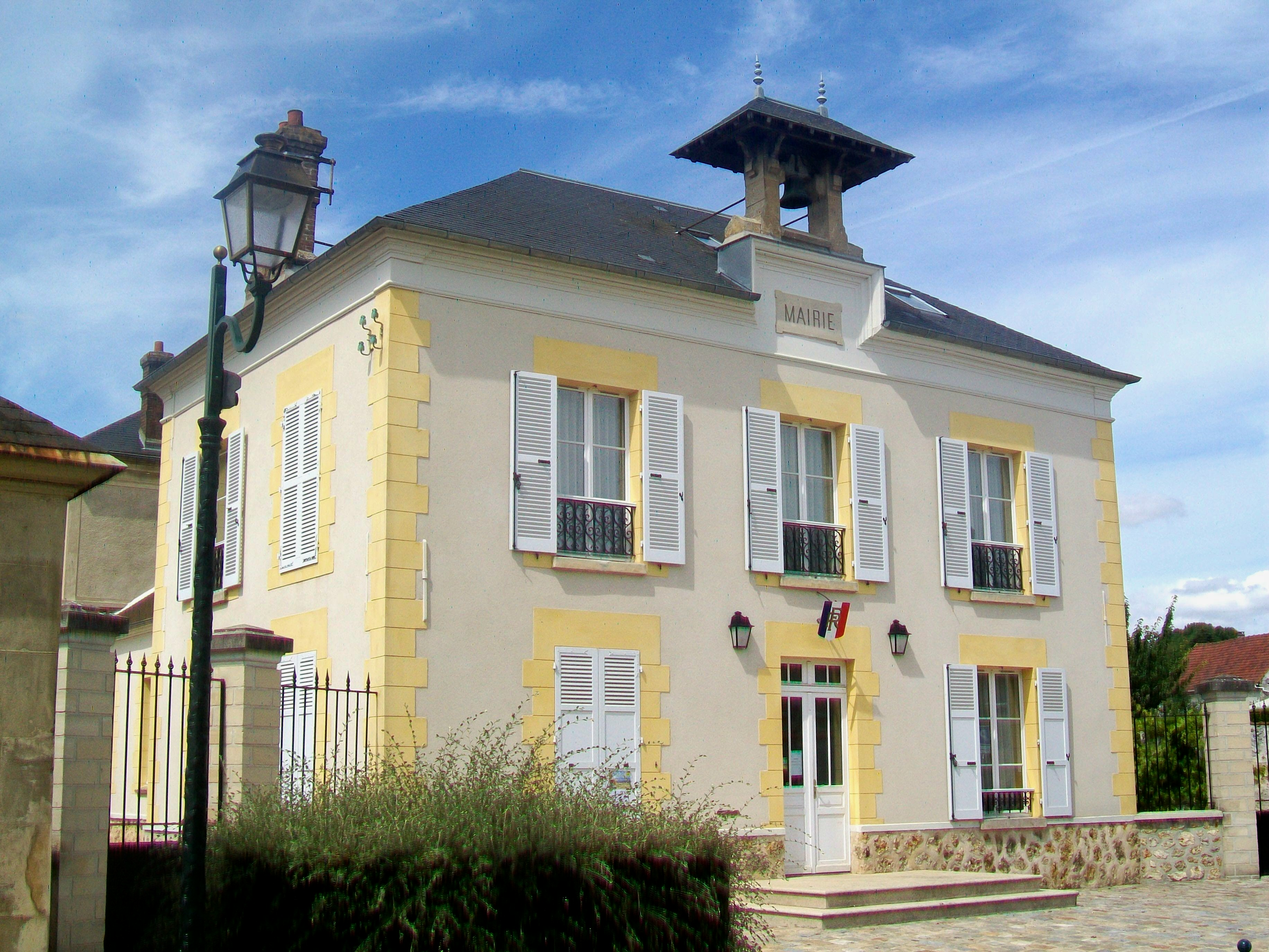 La mairie d'Avernes.